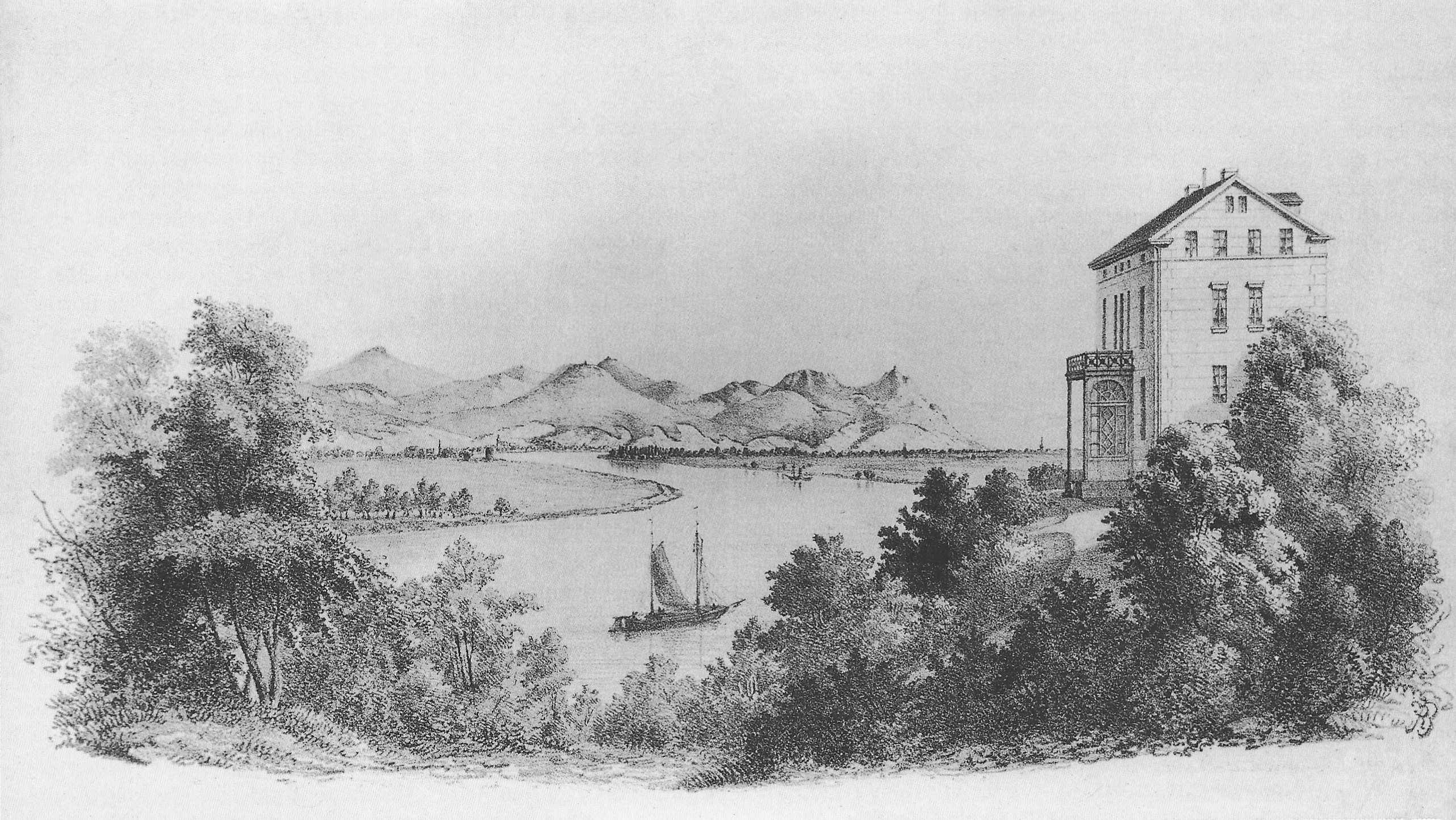 Villa Blume, Bonn: Entwurfszeichnung oder Auftragsbild nach Errichtung der Villa, Ansicht von Norden, im Hintergrund das Siebengebirge (Lithographie) 33,9 x 19,6 cm